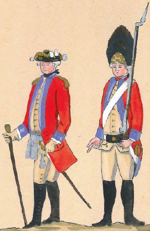 34. Regiment Gwardii Pieszej Koronnej